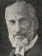 Nathan Porges (1848-1924), česko-německý rabín a vysokoškolský pedagog